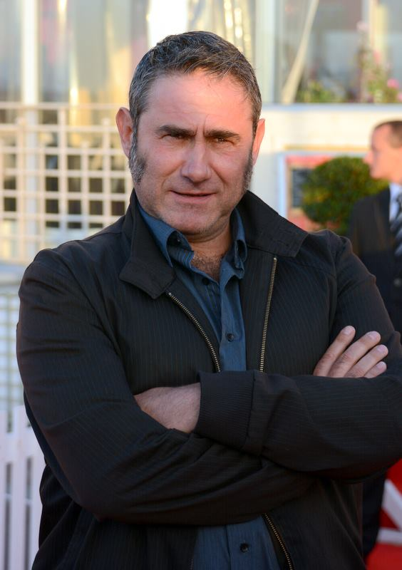 Sergi Lopez au festival du film de Cabourg